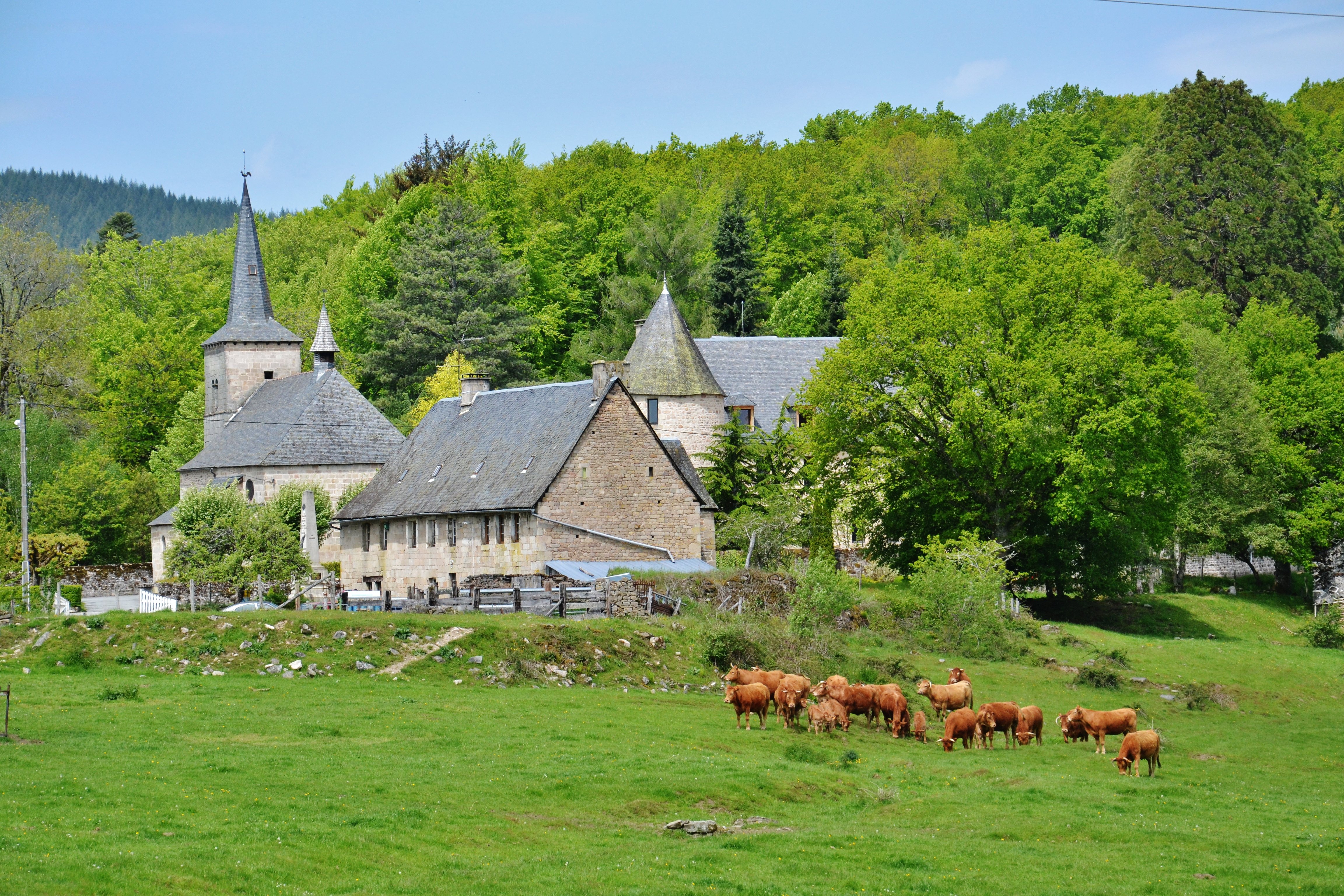 Davignac (Corrèze, France)